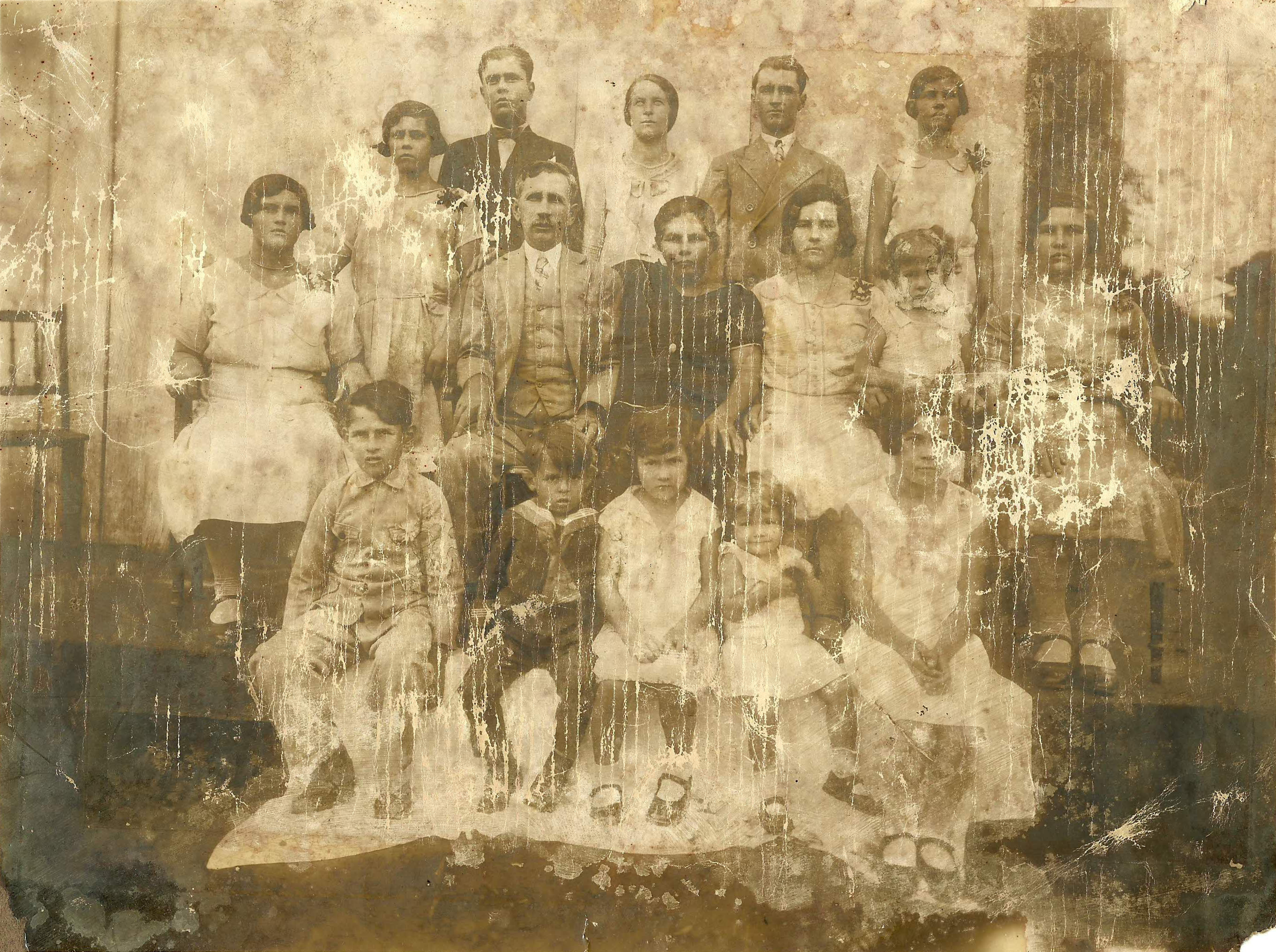 Membros da família de descendentes de italianos de Carli, de Fundão, em cerca de 1937: Ana, Armelinda, Pedro Alexandino, Teresa Zani, Iclérito, Júlia, Adônis, Albertina Lima, Maria, Laura, Eulália, Francisco, Ovídio, Angelina, Tarcília e Diva.